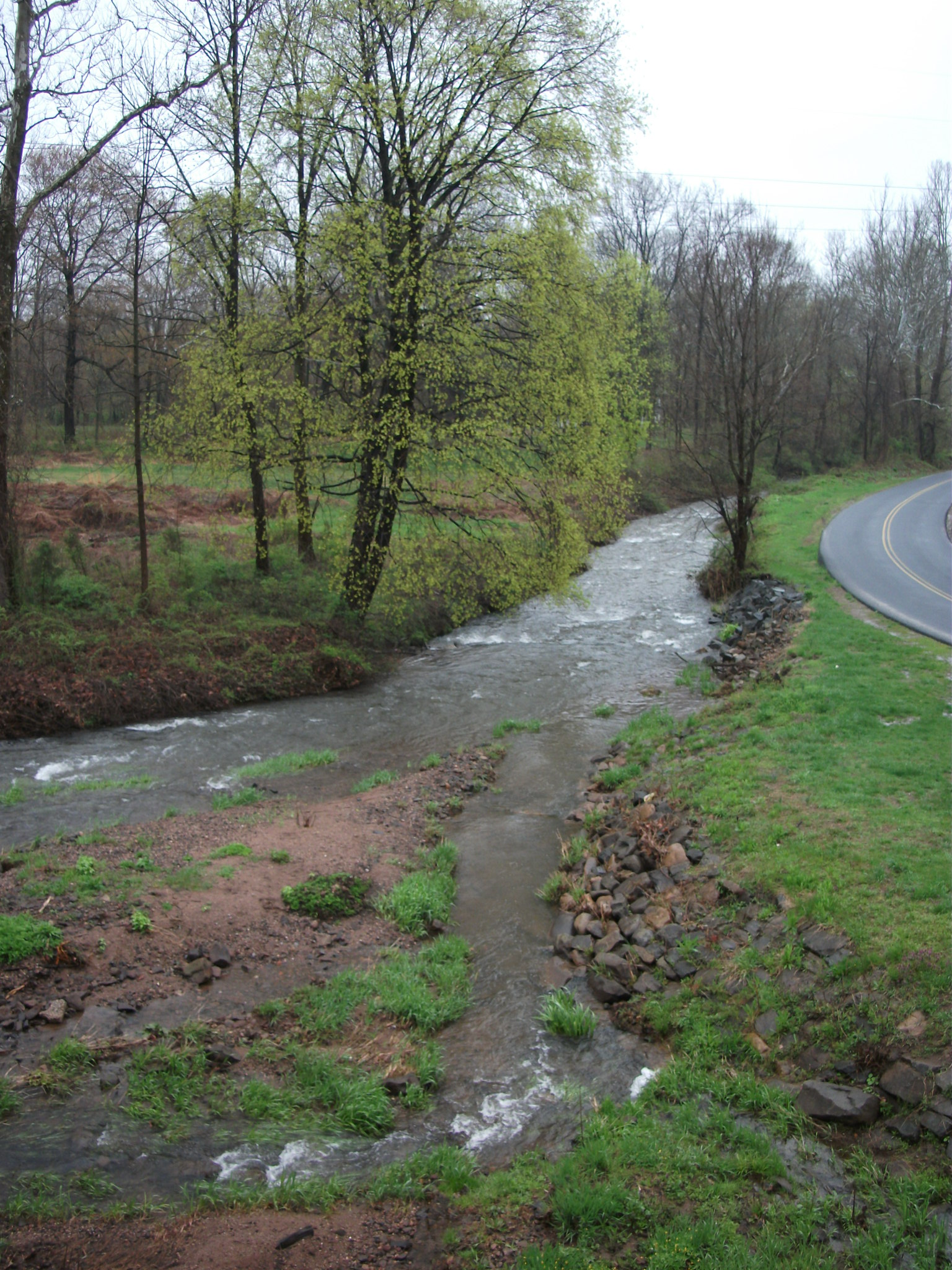 Allegheny Aqueduct - Gibraltar, Pennsylvania